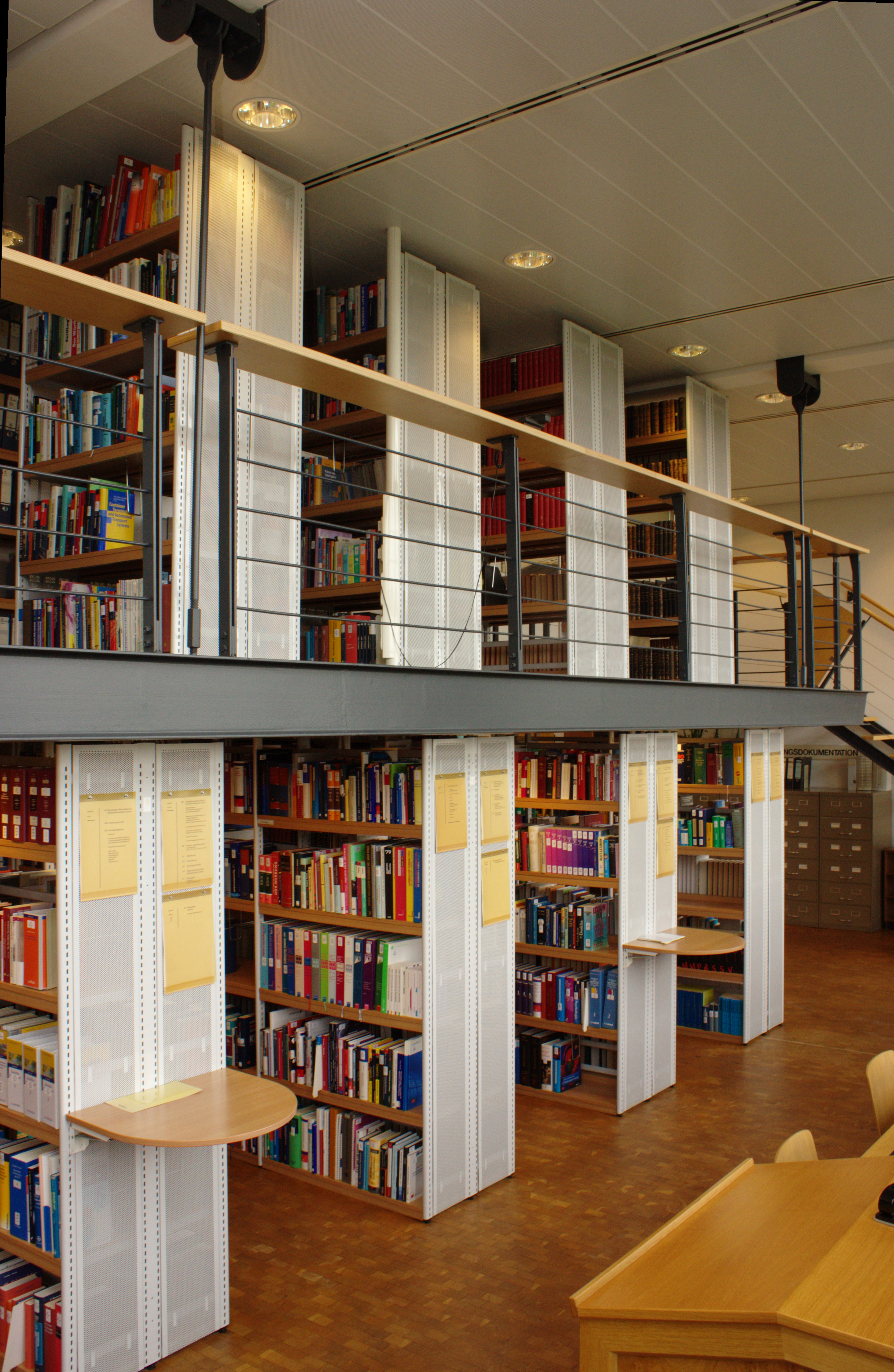 Das Bundespatentgericht in München. Fotografiert im Rahmen des Landtagsprojektes Bayern 2012. Wikipedia im Landtag – Bayern 17. bis 19. Juli 2012 in München Dieses Foto wurde im Rahmen des Projektes „Wikipedia im Landtag“ erstellt.